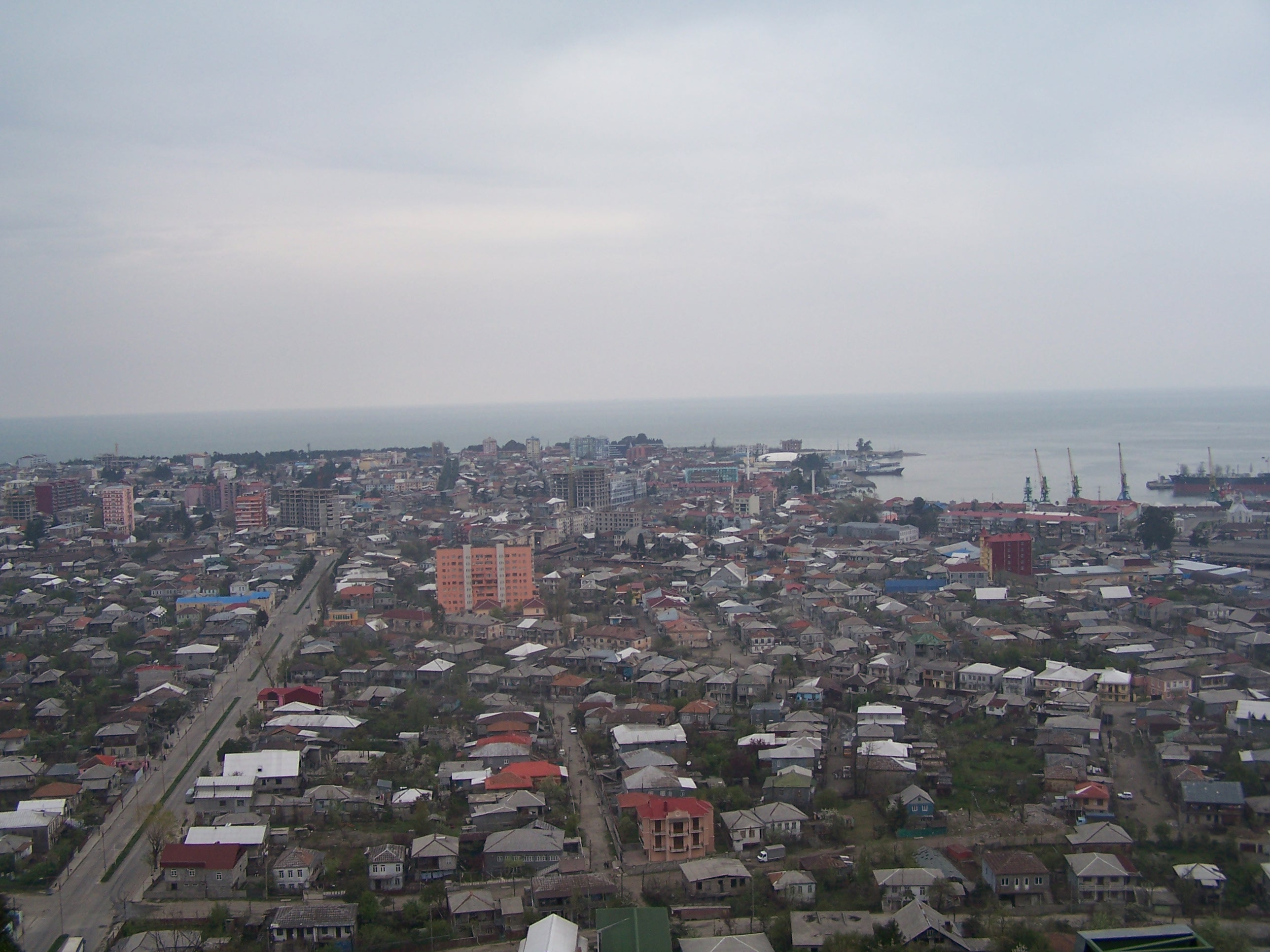 Batumi